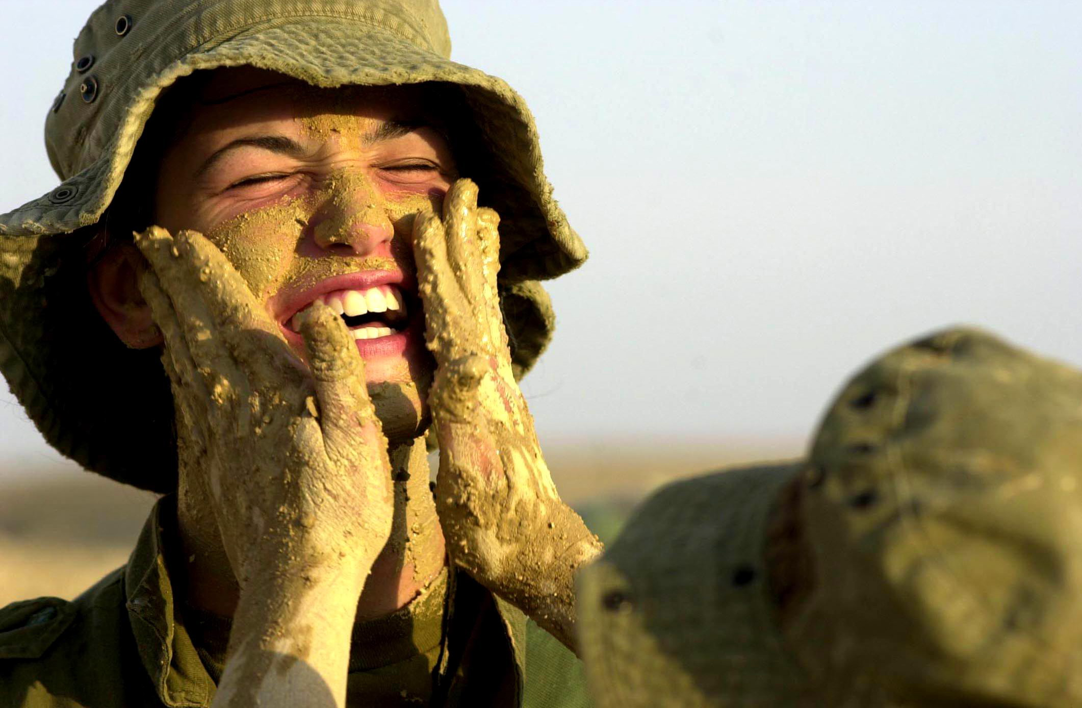 May 19, 2005. As part of the Infantry Instructors Course, female soldiers have a field training week which includes individual and group drills, navigation practice, sleeping in the field and camouflage training. כחלק משבוע אימוני השדה בקורס, מדריכות חי"ר נדרשות לעבור תרגילי יחיד וקבוצה, אימוני ניווט, שינה והסוואה בשטח ועוד. בסוף הקורס המדריכות מוצבות בתפקידים שונים כמדריכות בזרוע היבשה.